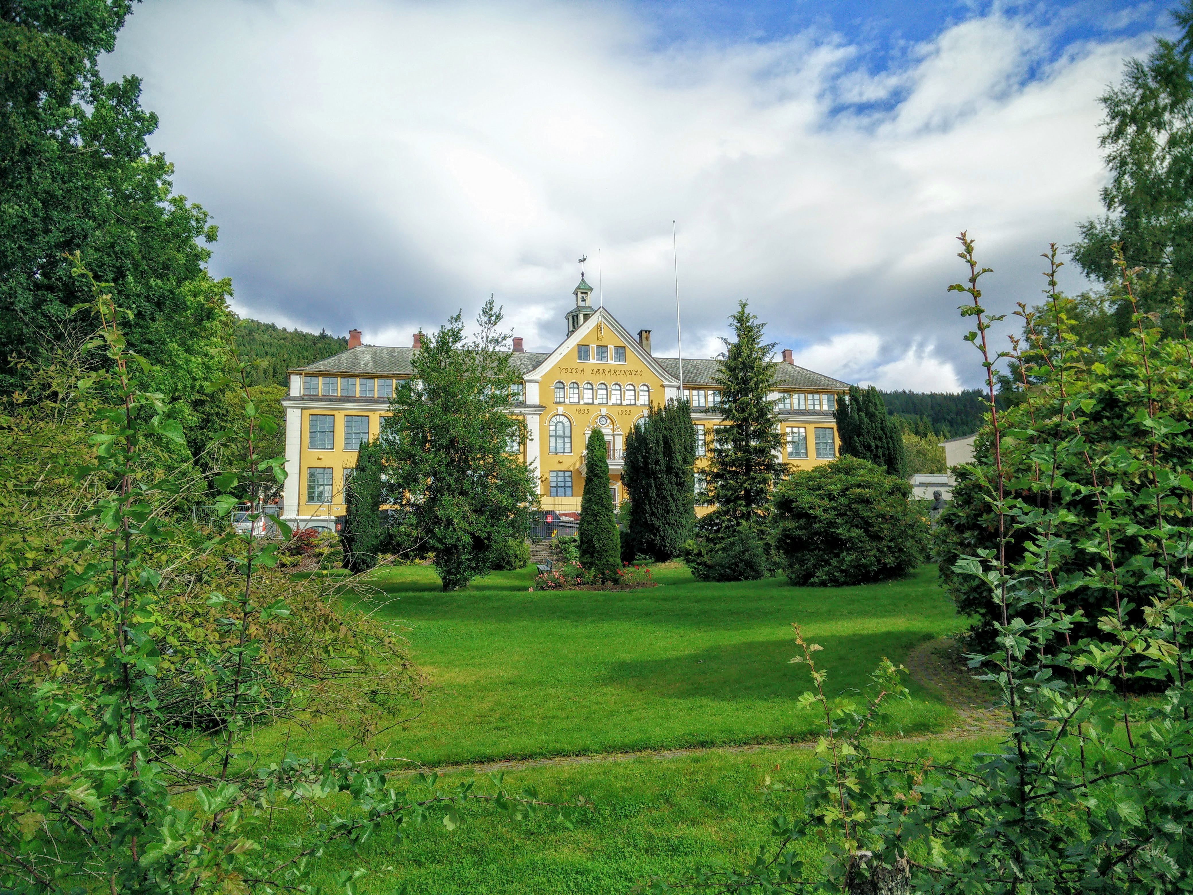 Henrik Kaarstad-huset 2015.